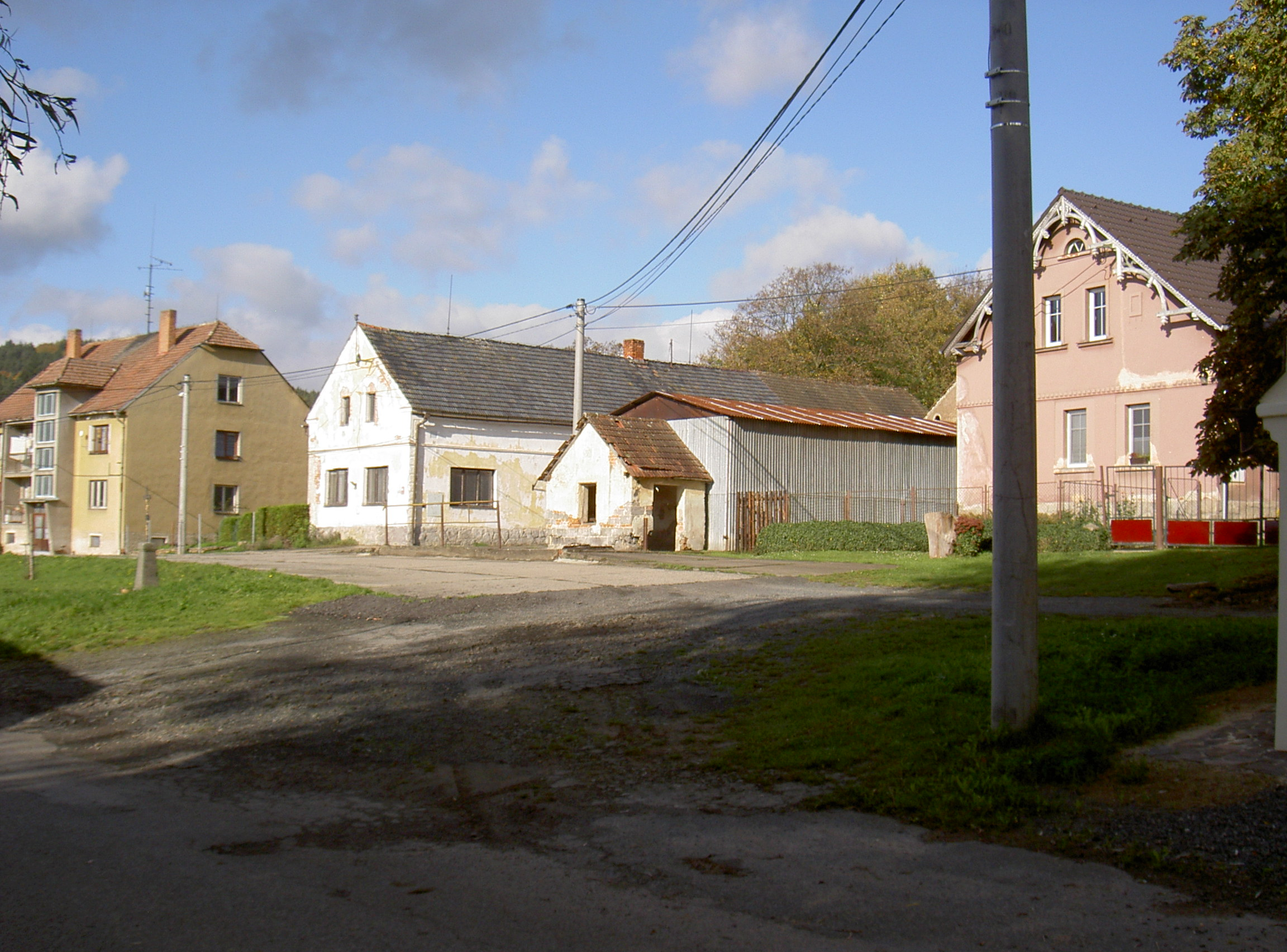 Häuser in Holubeč